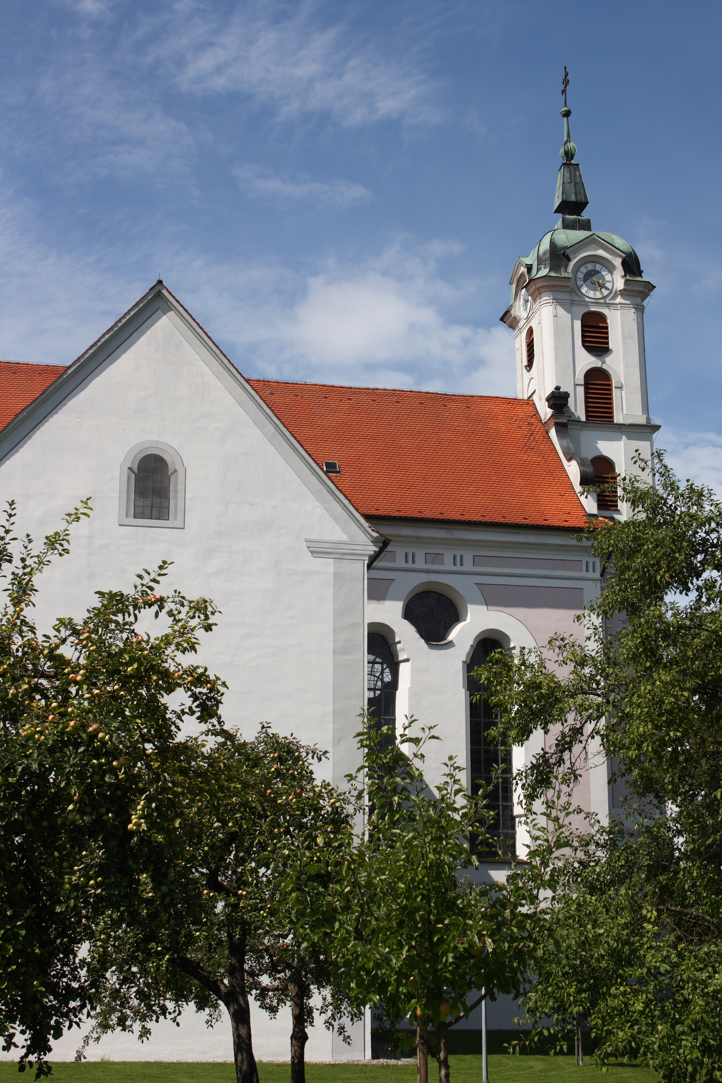 Katholische Pfarr- und Wallfahrtskirche St. Peter und Paul in Oberelchingen, einem Ortsteil von Elchingen im Landkreis Neu-Ulm (Bayern)